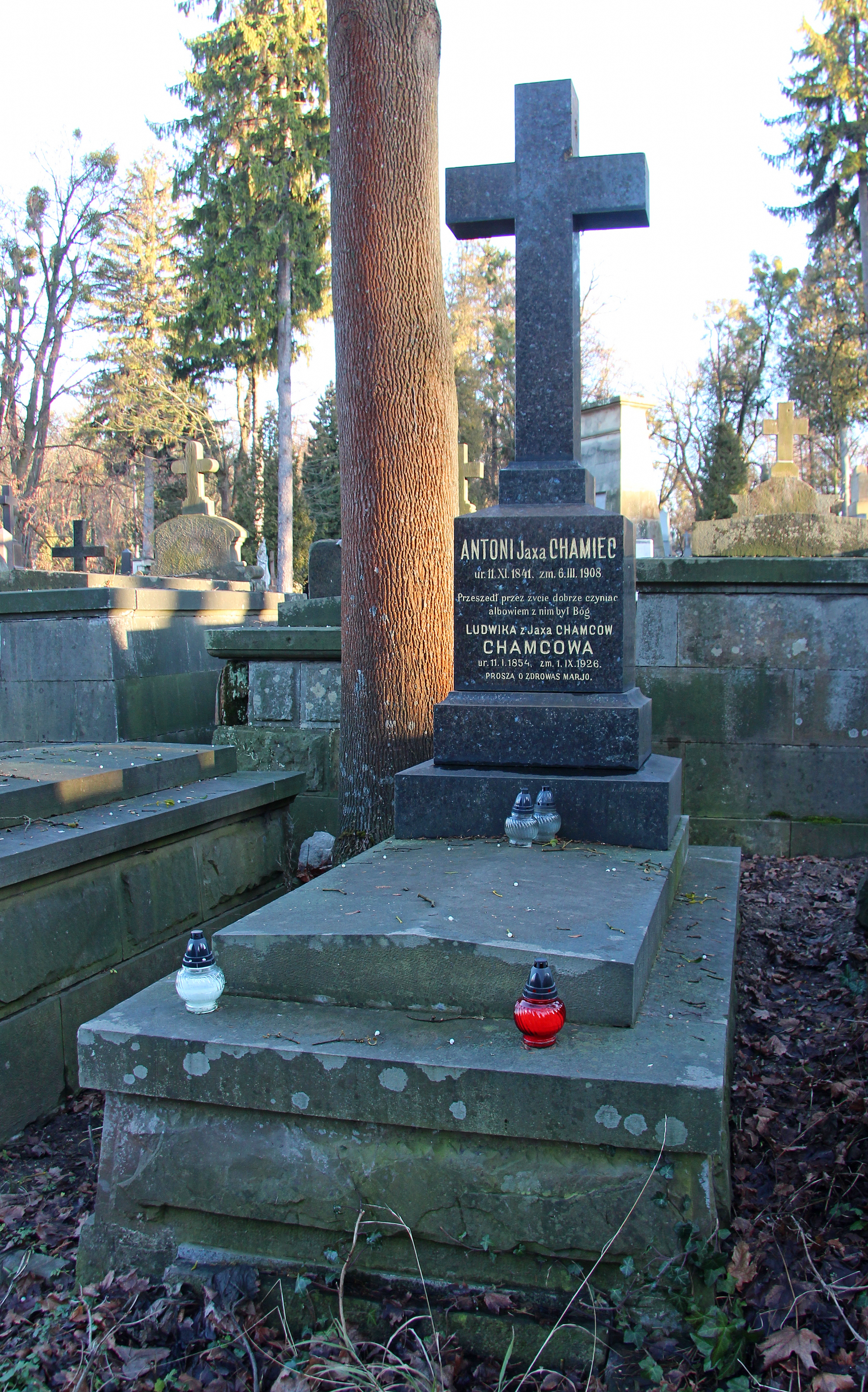 Гробівець родини Хамец. Личаківський цвинтар ,поле № 78.